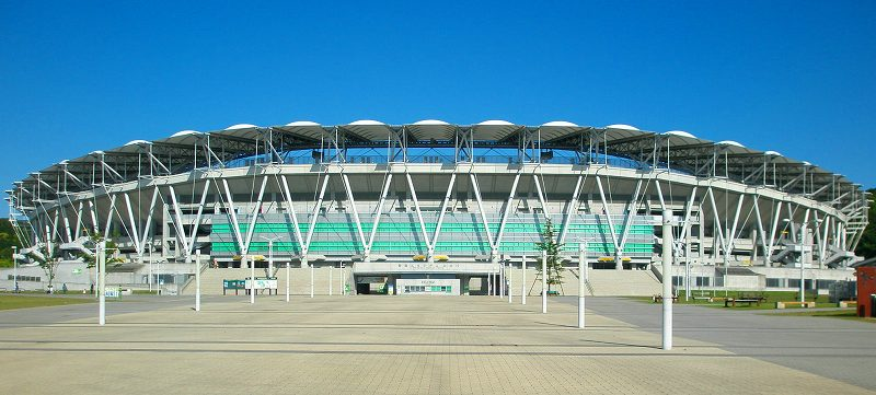 Shizuoka Stadium, Fukuroi and Kakegawa city, Shizuoka Prefecture, Japan